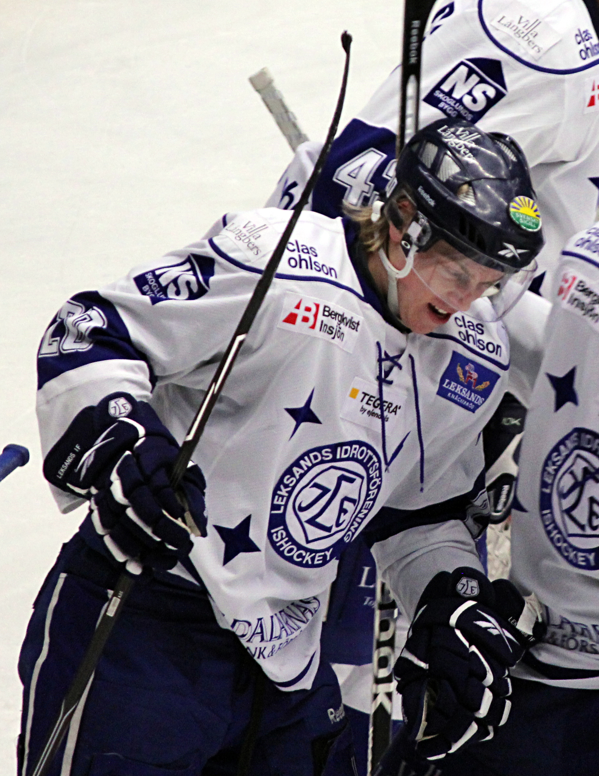 Ken André Olimb för Leksands IF mot VIK Västerås HK 29 januari 2011.